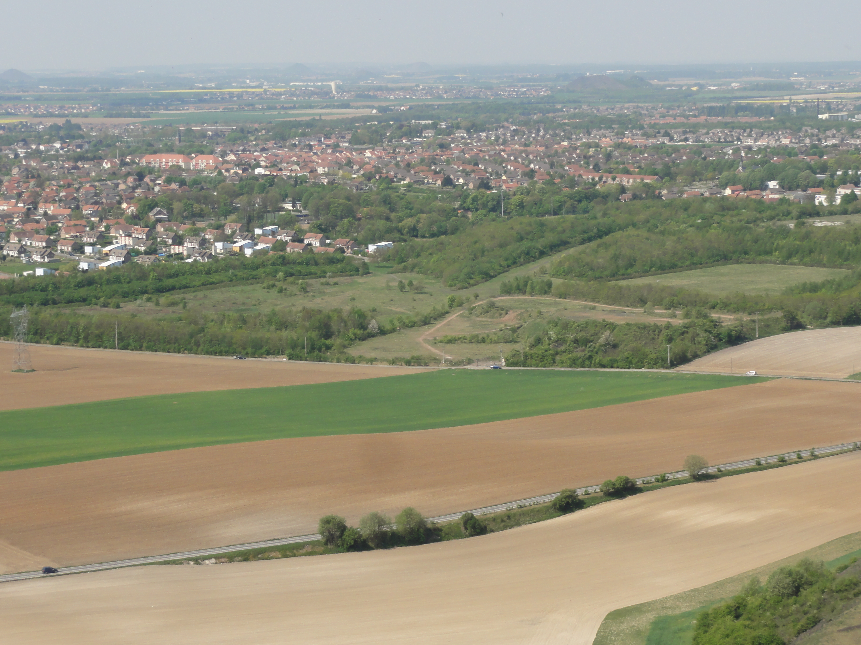 Terril no 59 dit 5 de Béthune, disparu, fosse n° 5 - 5 bis de la Compagnie des mines de Béthune dans le bassin minier du Nord-Pas-de-Calais, Loos-en-Gohelle, Pas-de-Calais, Nord-Pas-de-Calais, France.